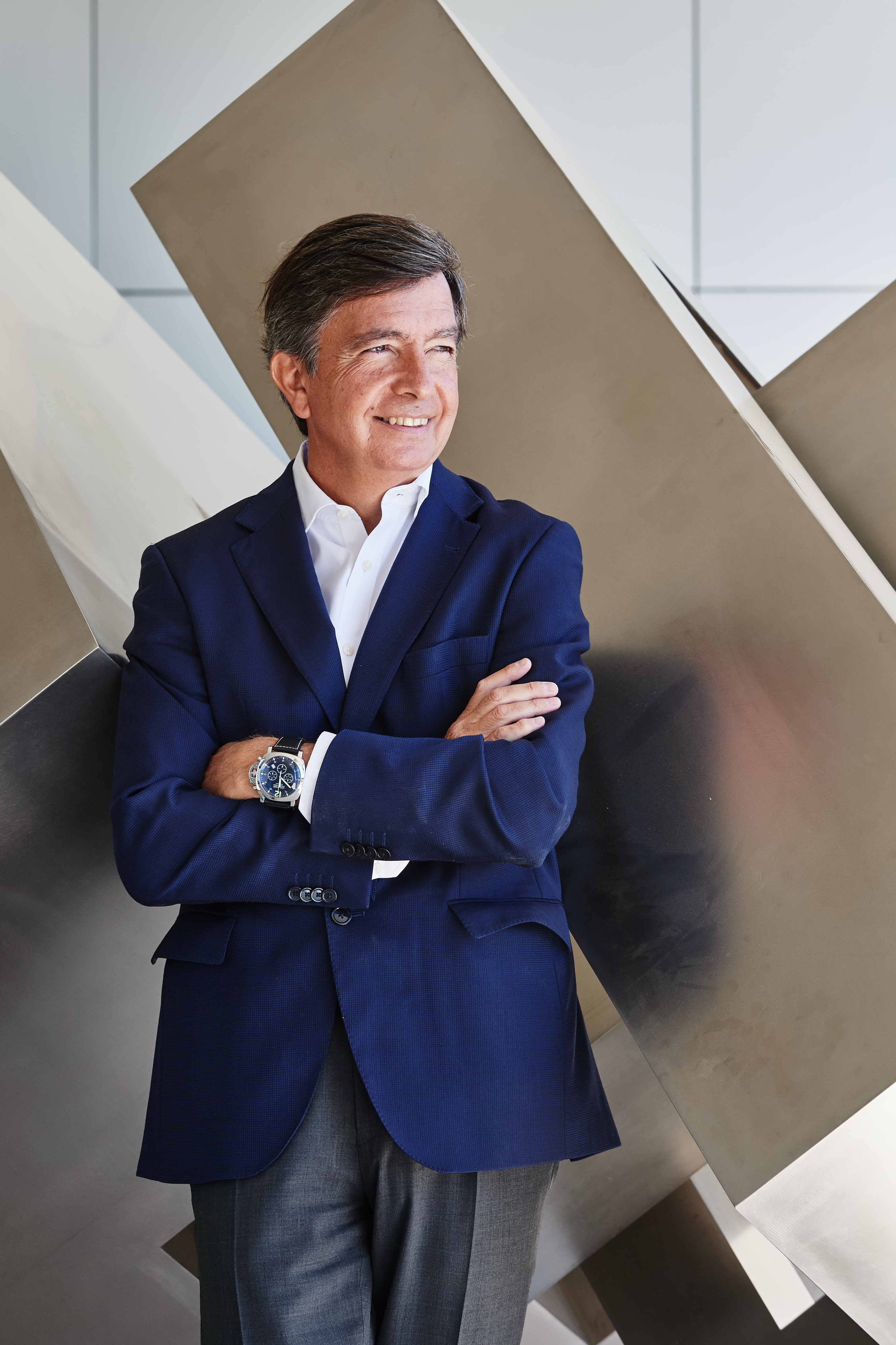 Carlos Lamela. Arquitecto español